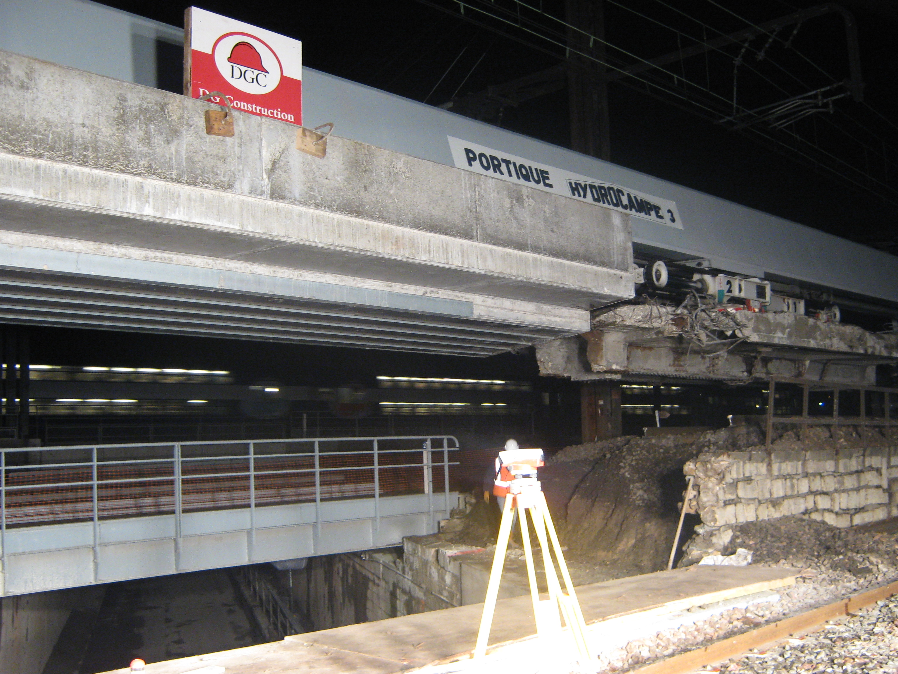 Portique hydrocampe entre Vigneux sur Seine et Villeneuve St Georges chargé de l'ouvrage à poutrelles enrobées à installer (à l'avant plan) et de l'ouvrage ancien déposé. On distingue clairement les voies coupées net sous l'ancien ouvrage. La phase en cours consiste à préparer la pose du nouveau tablier. Les rails seront raboutés en finition.